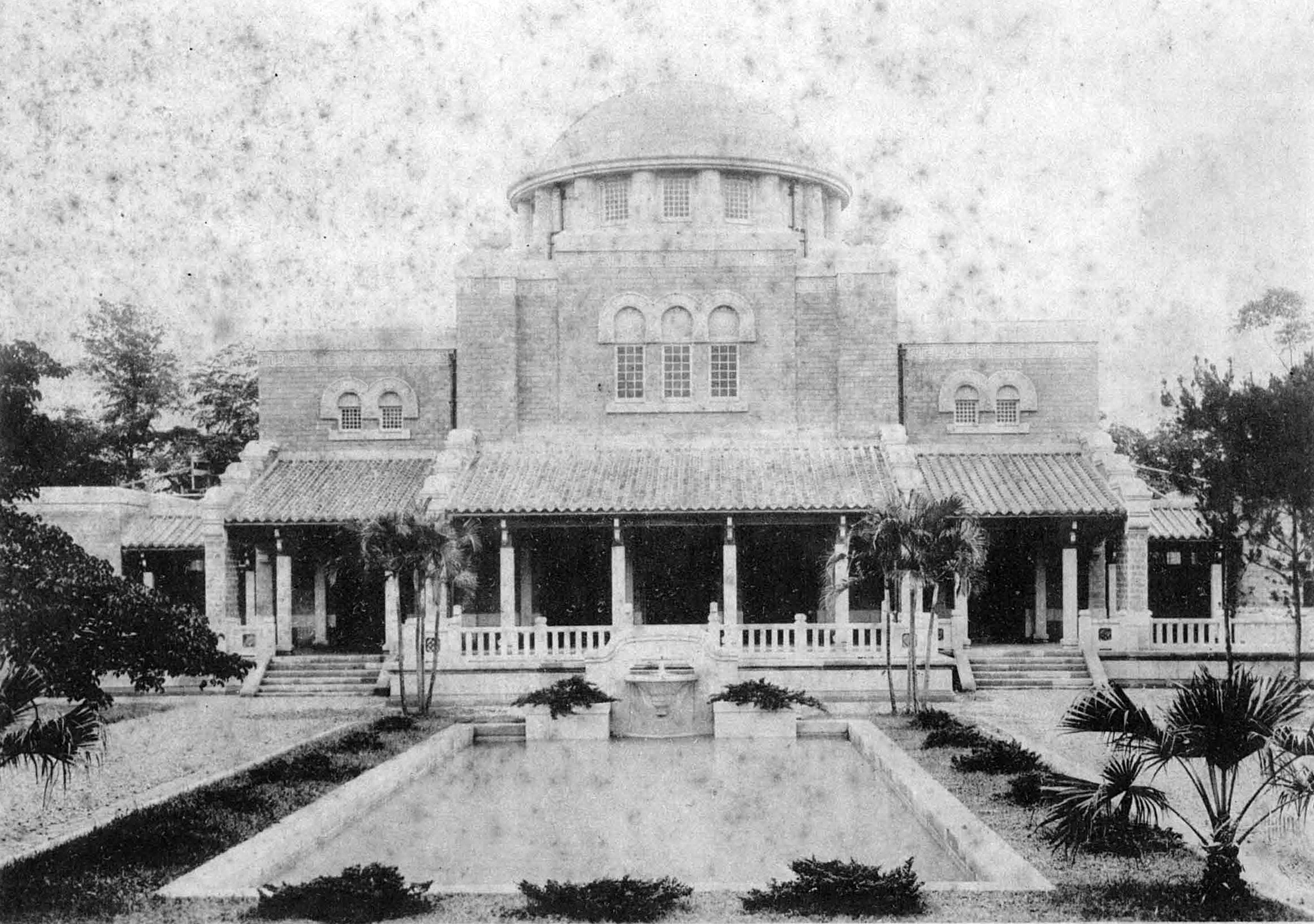 中文（台灣）: 建功神社神殿，呈現和漢洋混和的風格，神殿前方為神池。